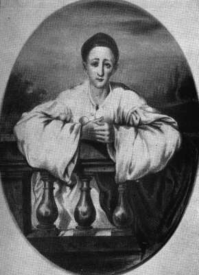 Summary Der französische Pantomime Jean-Gaspard "Baptiste" Deburau im Bühnenkostüm des Pierrot. Zeitgenössische Porträtzeichnung von A. Bouquet, um 1830.